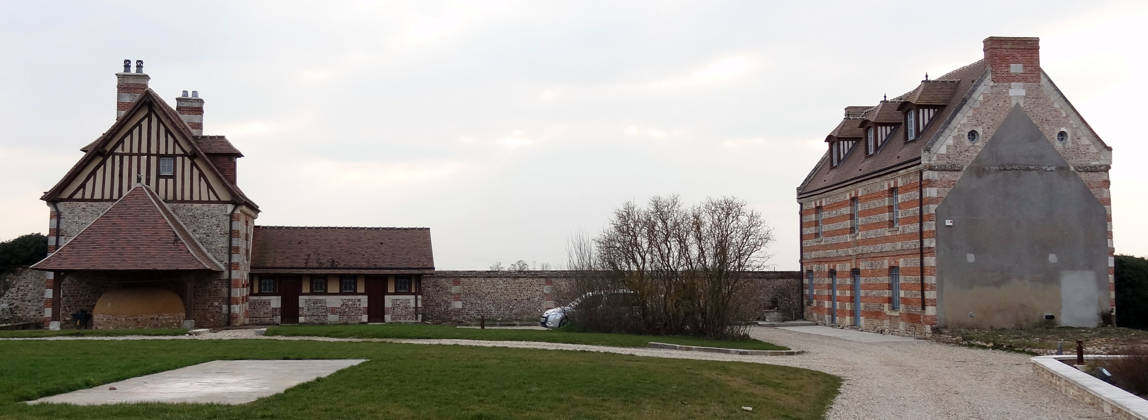 La Commanderie de Saint-Étienne-de-Renneville était une maison templière prospère au Moyen-Âge. Elle est située près d'Evreux en Normandie. On y voit, de gauche à droite, le fournil, la maison du régisseur et la grange à blé.